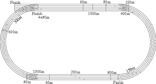 Valhalla IP running track